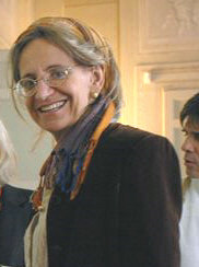 Foto Alessandra Contini